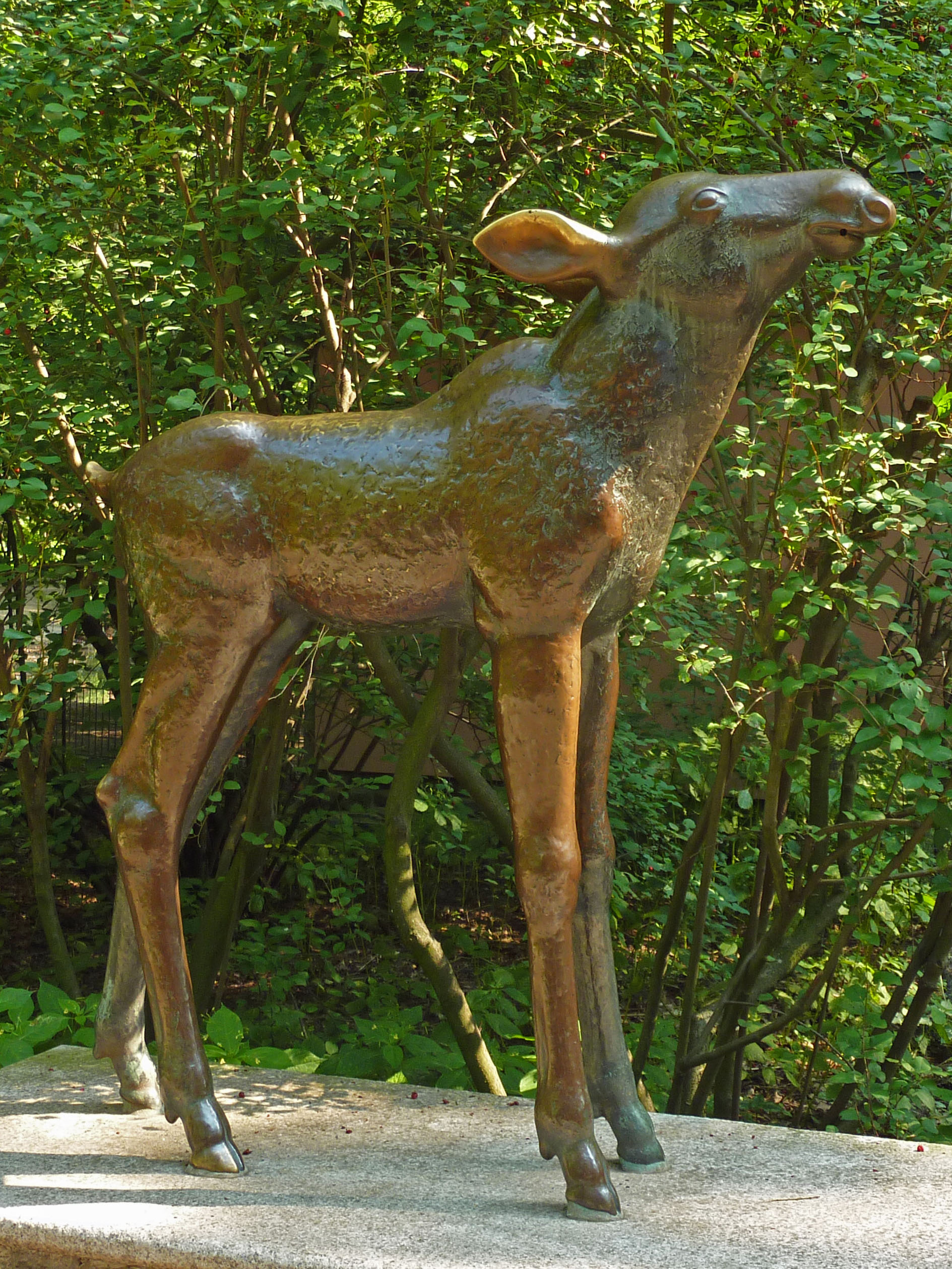 Bronzeplastik 'Elchkalb' von Harry Christlieb im Tierpark Berlin (Friedrichsfelde).